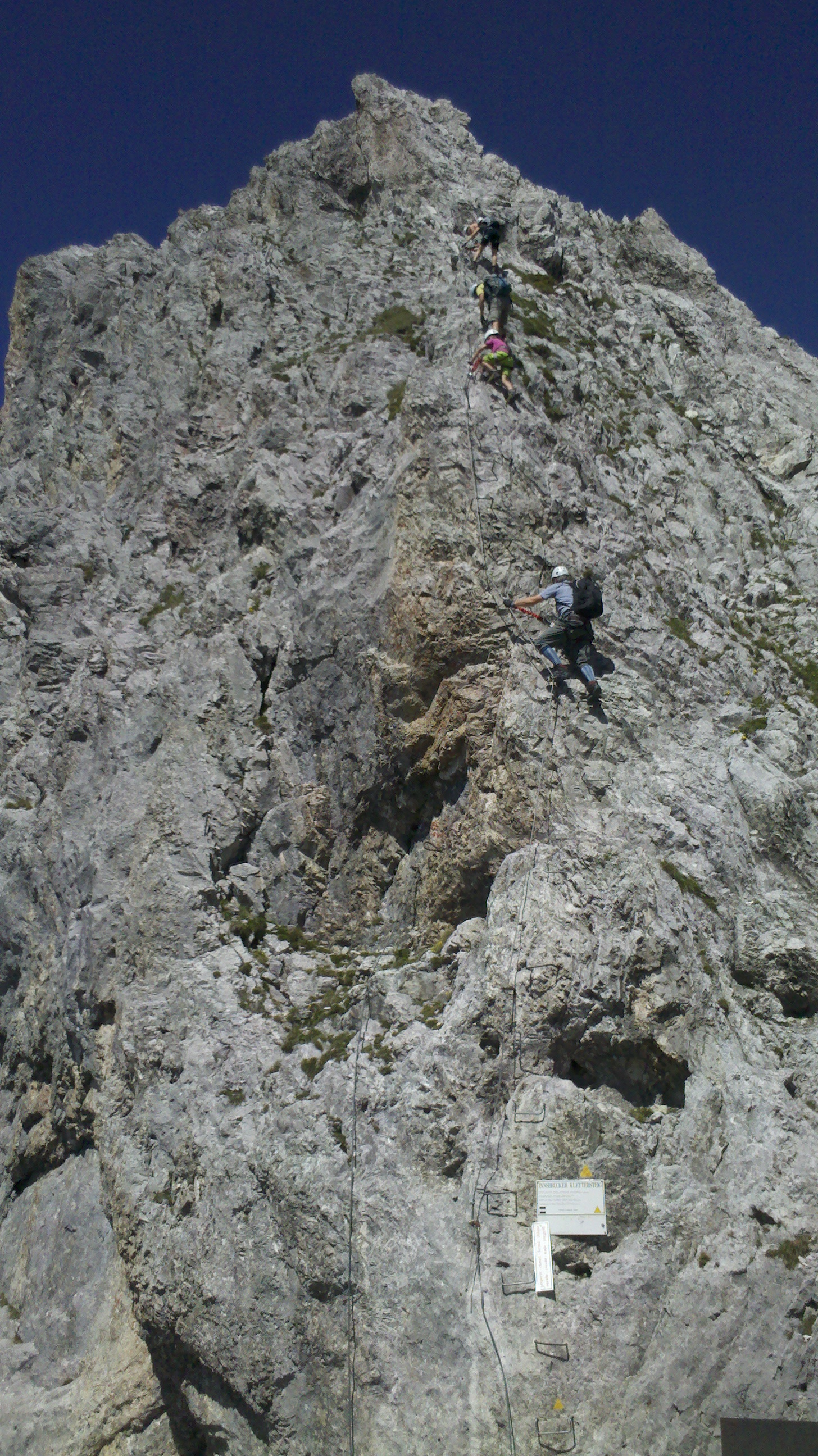 Einstieg des Innsbrucker Klettersteiges